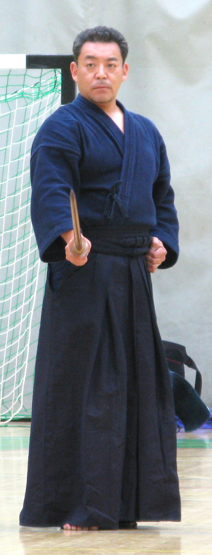 Kon Yoshinobu-sensei, Tankendo kyoshi 7.dan, Kendo renshi 6.dan Tohoku Fukushi University, Miyagi